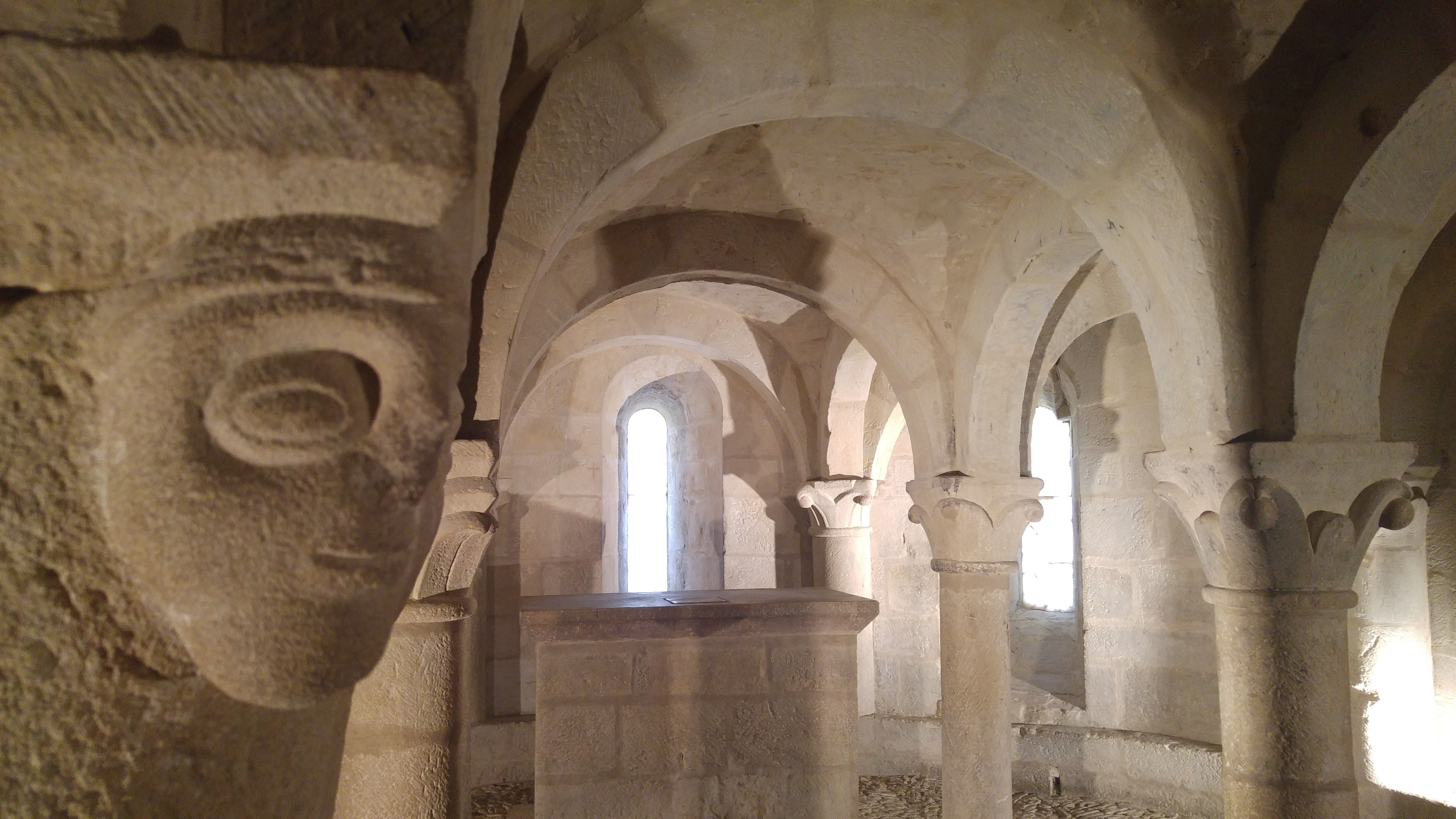 San Martin Unx-eko kripta.